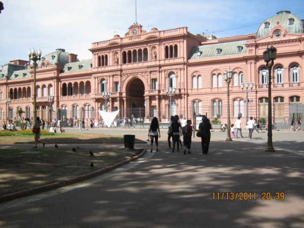 הארמון הנשיאותי של אווה וחואן פרון בבואנוס איירס